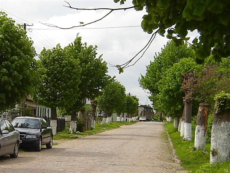 Droga przez Zaspy Wielkie.